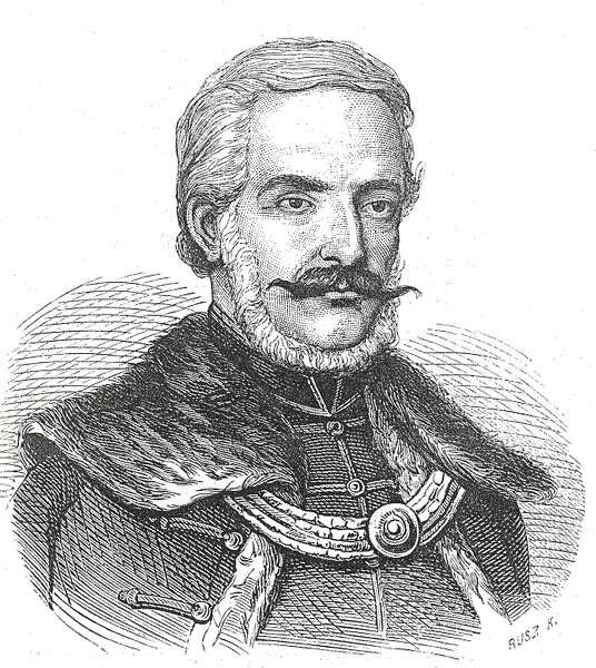 Csányi László politikus, kormánybiztos, miniszter, az 1848–49-es szabadságharc vértanúja. Rusz Károly metszete. Megjelent a Vasárnapi Újságban, 1868-ban